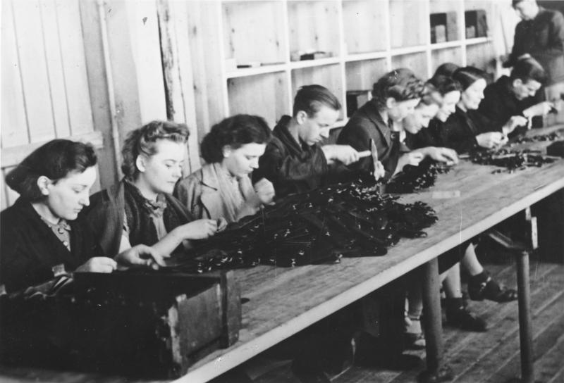 Polen, Zwangsarbeiter in Gewehrfabrik In einer polnischen Gewehrfabrik: Polnische Arbeiter und Arbeiterinnen bei der Herstellung von Kastenböden für deutsche Infanteriegewehre. PK-Dieck-Scherl Bilderdiest 7433-40 "Fr" OKW